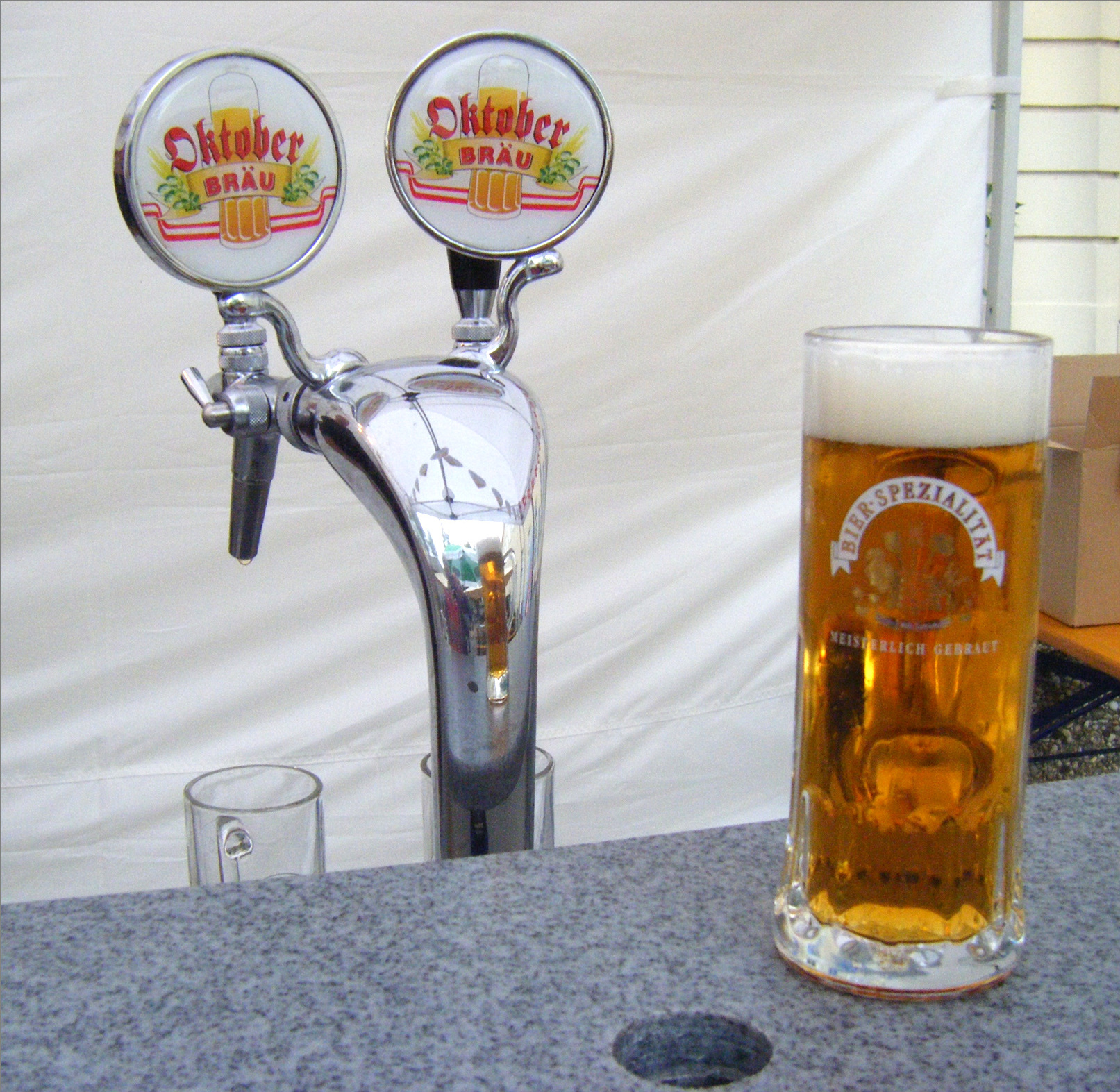 Universitätscampus Altes AKH Bierfest